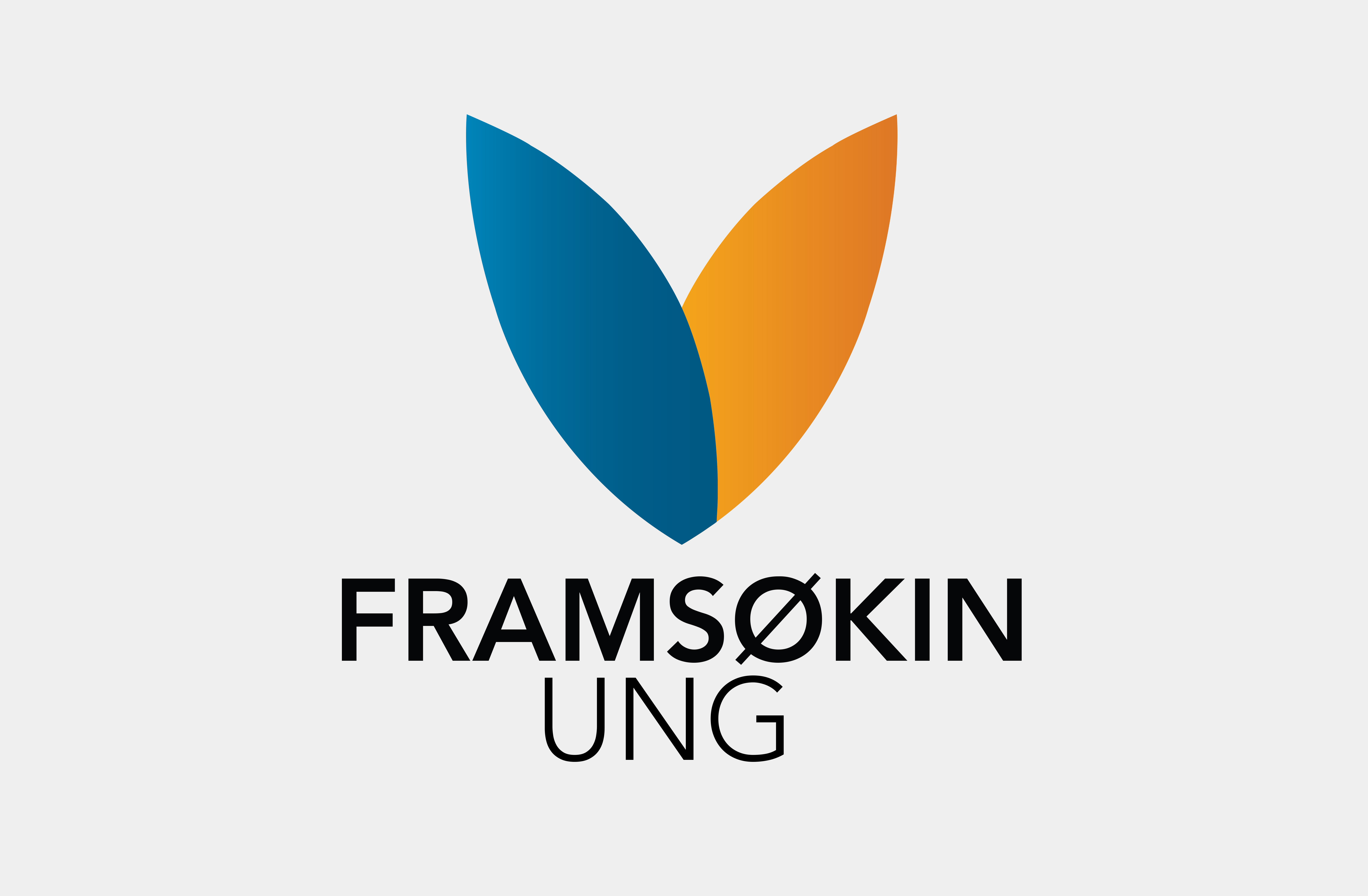 Føroyskt: Búmerkið hjá Framsøkin Ung